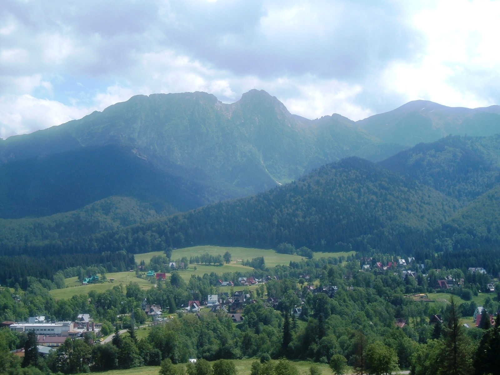 Zakopane, Poland